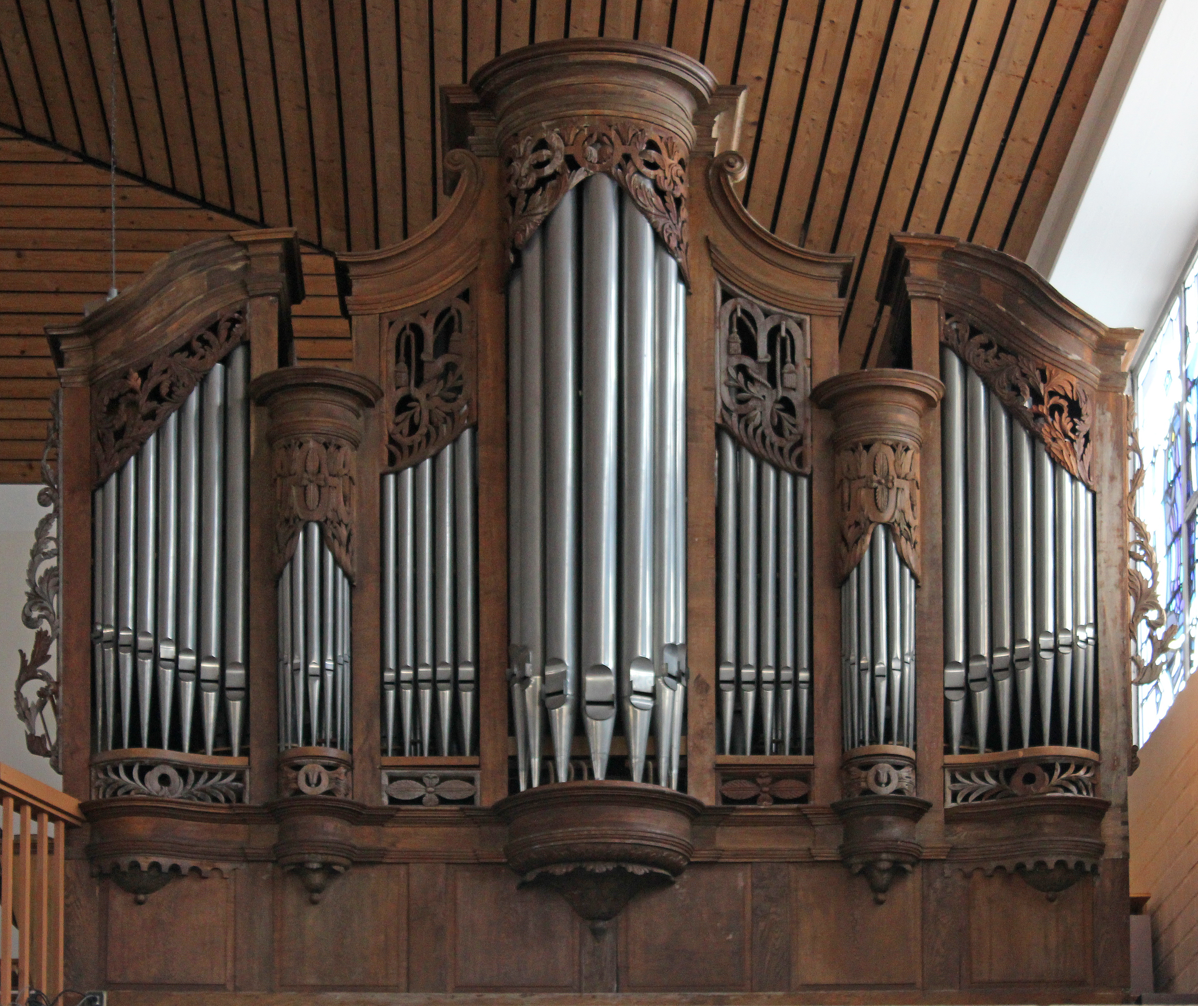 Prospekt der Stumm-Orgel in der katholischen Kirche Mariä Heimsuchung in Ommersheim, Gemeinde Mandelbachtal, Saarpfalz-Kreis, Saarland